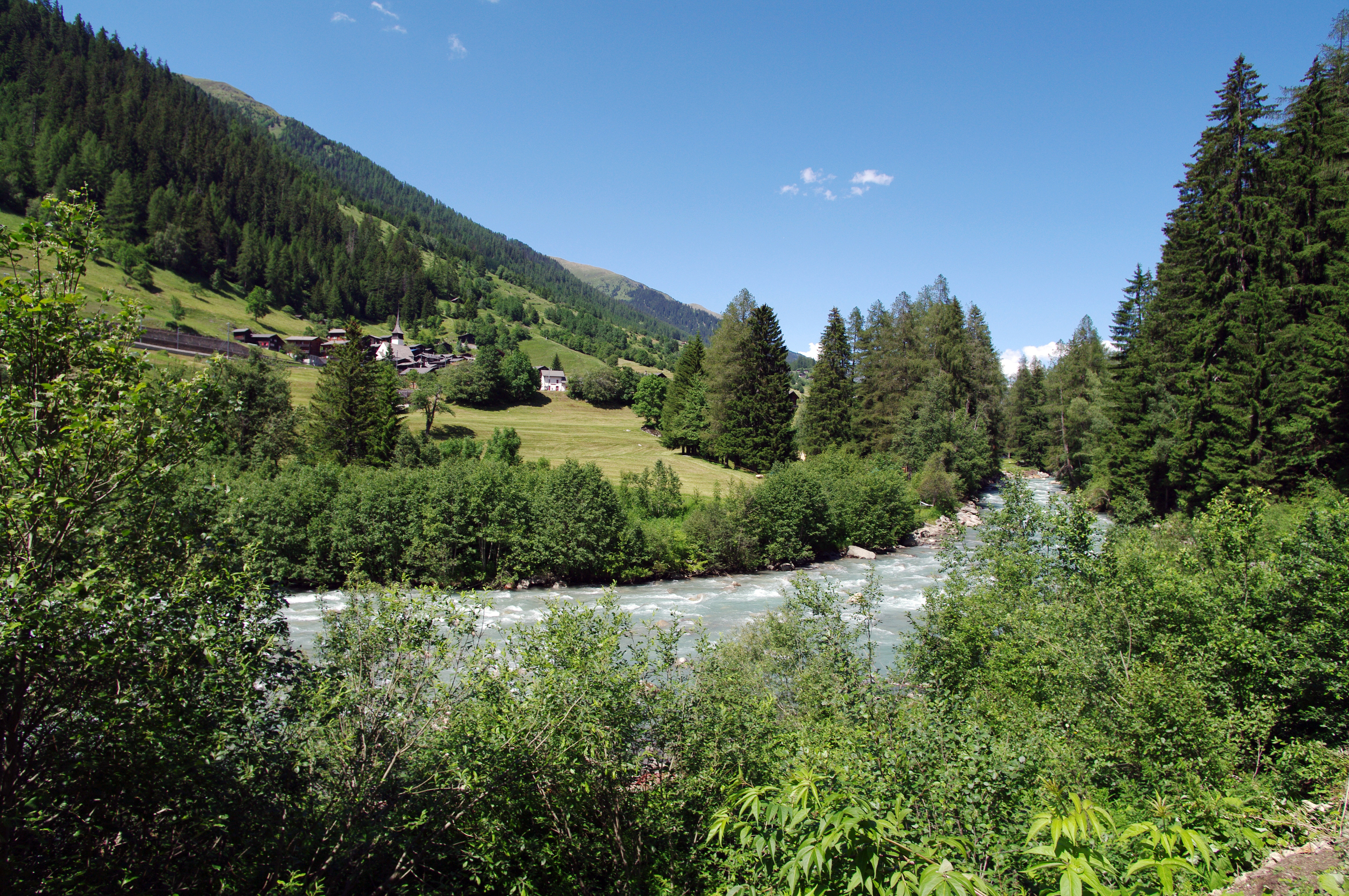 Ort: Niederwald. Foto: Brigitte Wolf